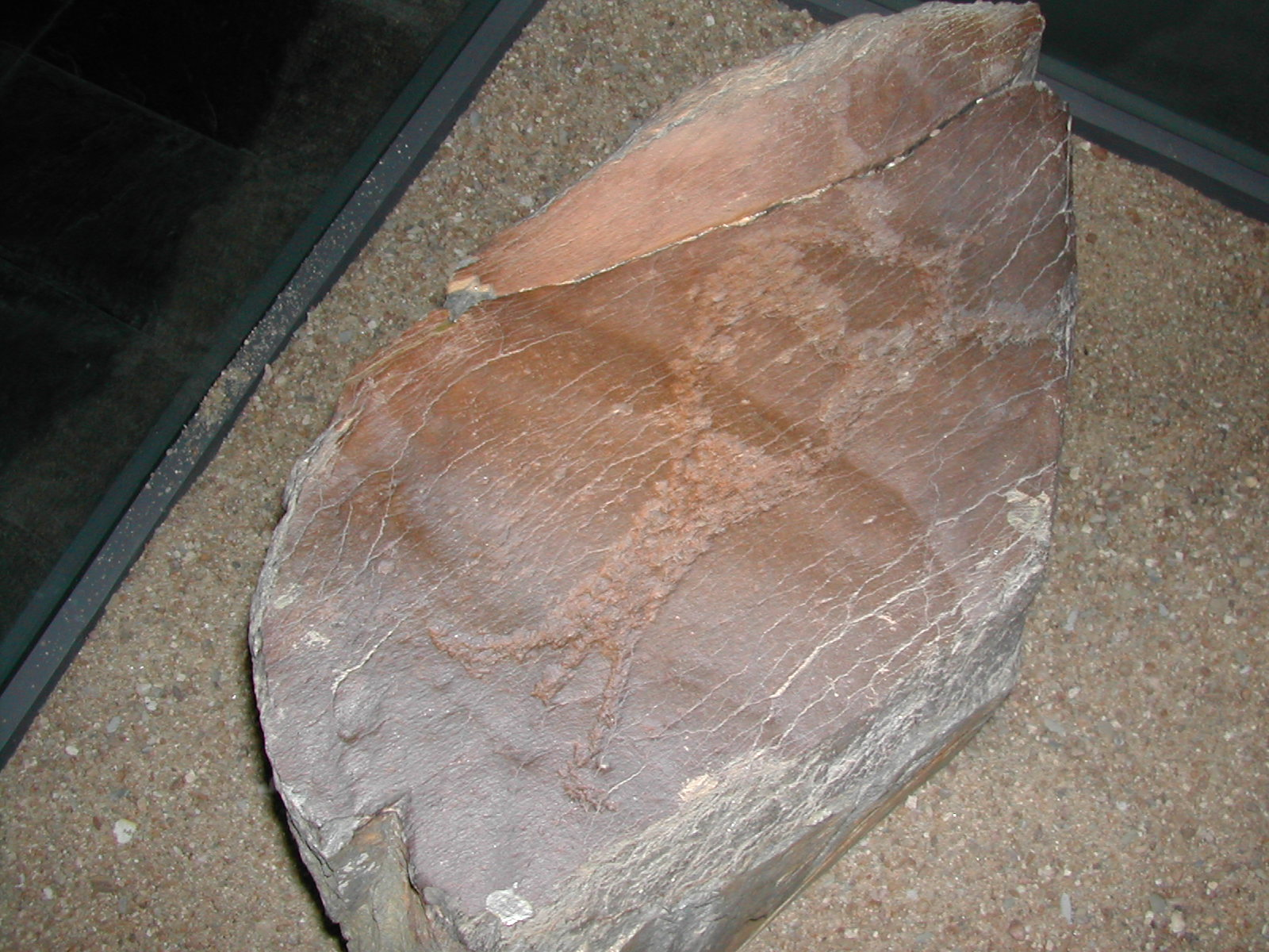 Gravura rupestre antropomórfica. Vila Velha de Ródão. Portugal